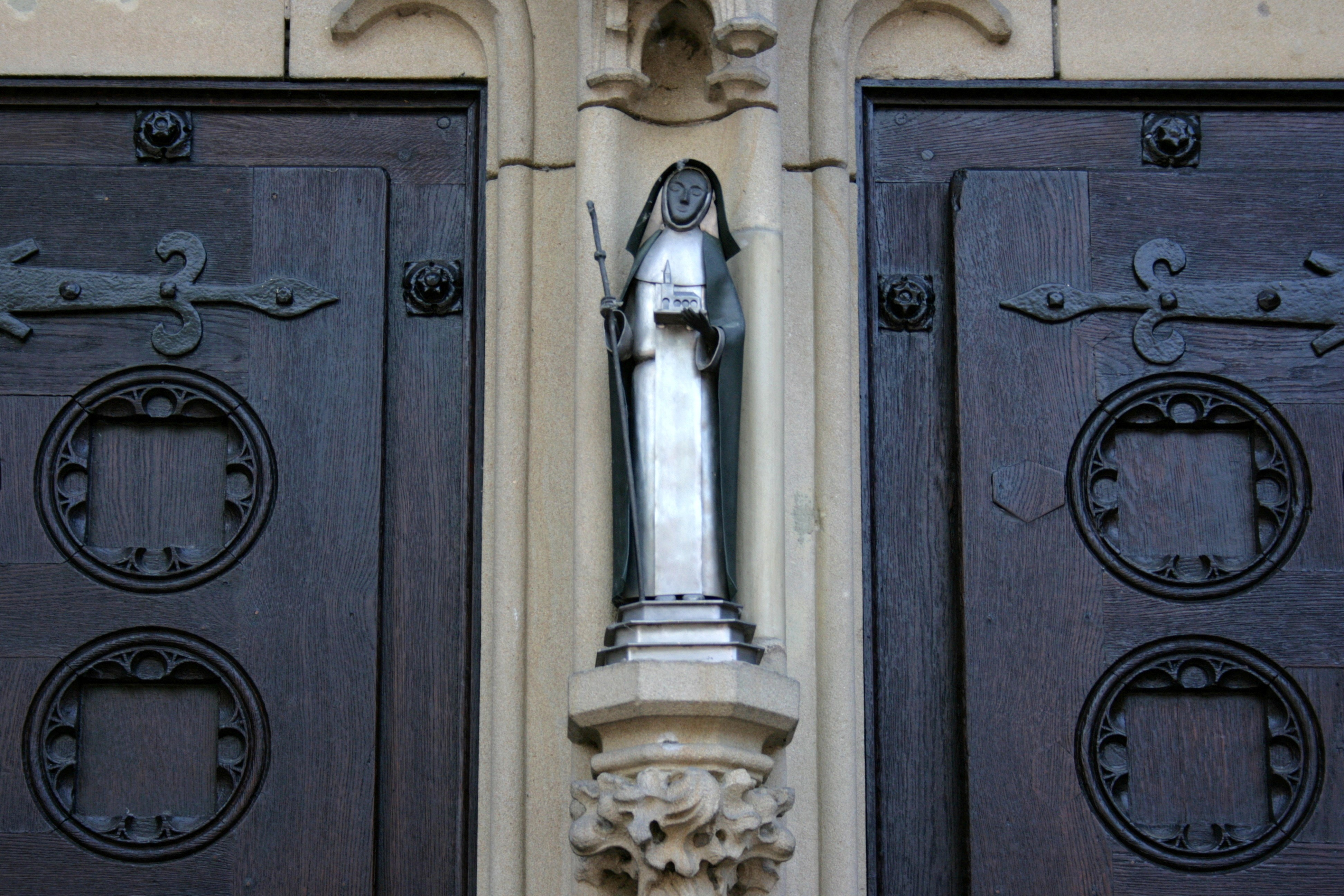 Sankt Aldegundis in Emmerich am Rhein